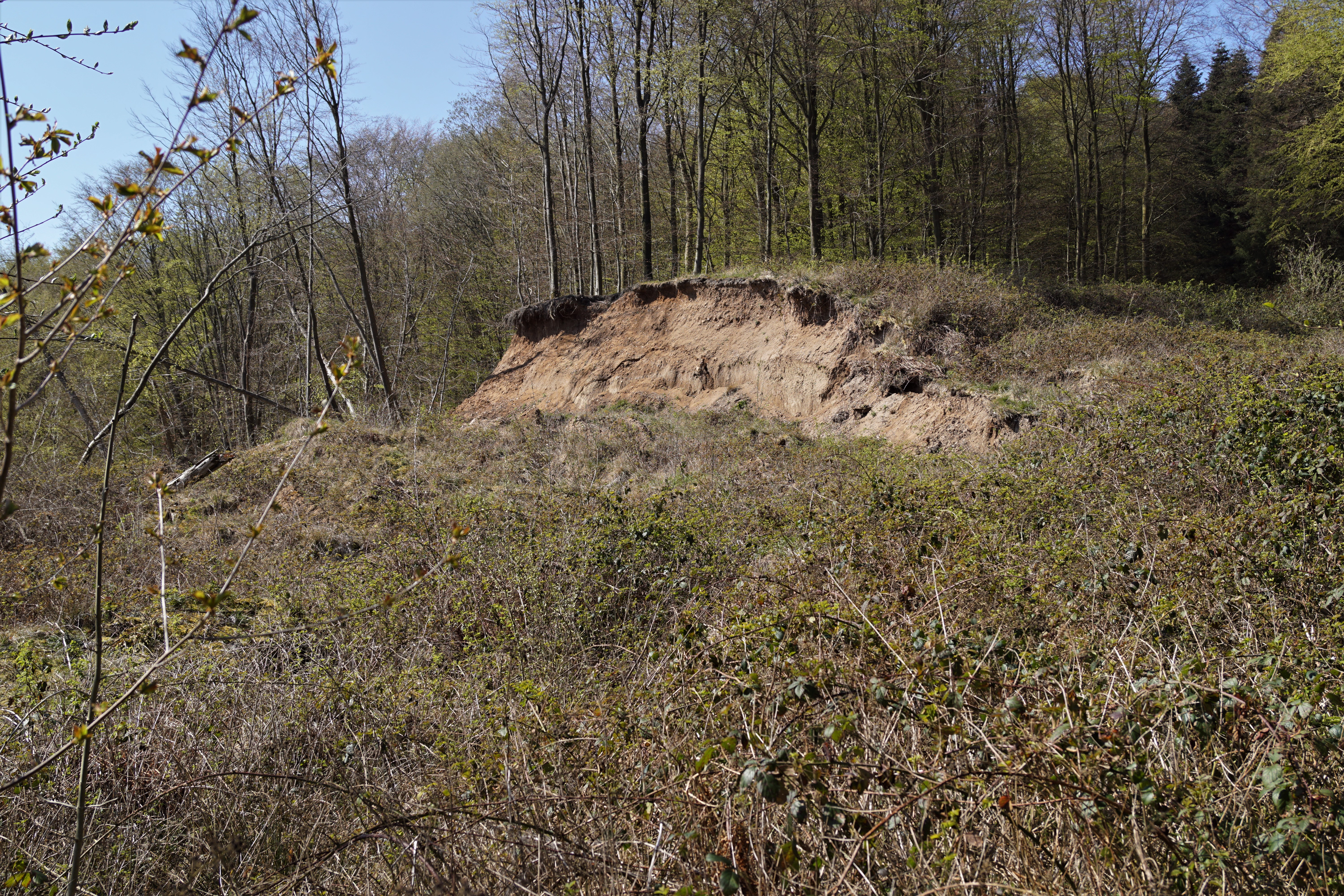 Store bjergfald i Staksrode Skov, et skred fra 2012